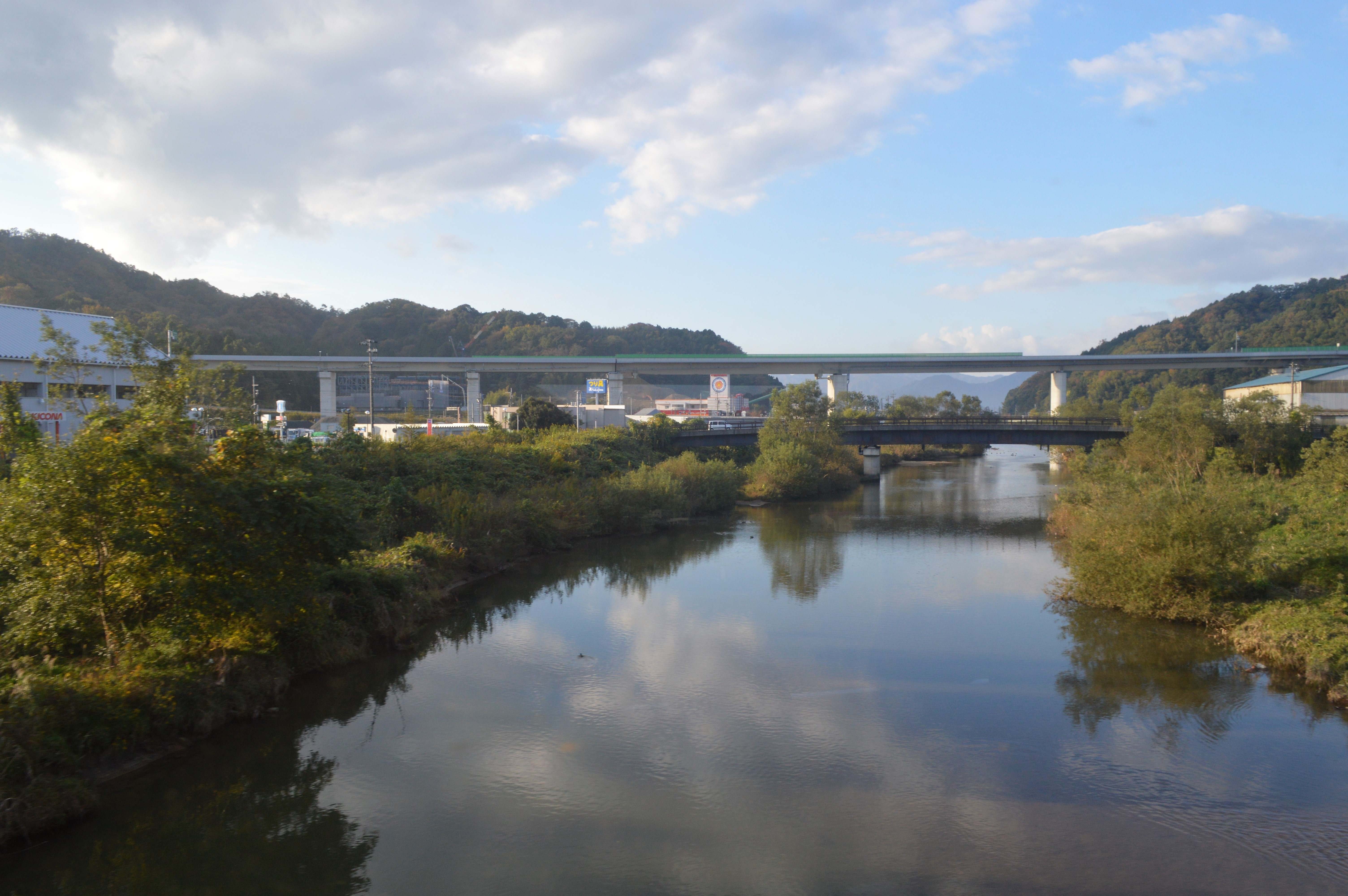 与謝郡与謝野町の野田川。京都丹後鉄道の橋梁上から上流（南西）を向いて撮影。奥は野田川高架橋。